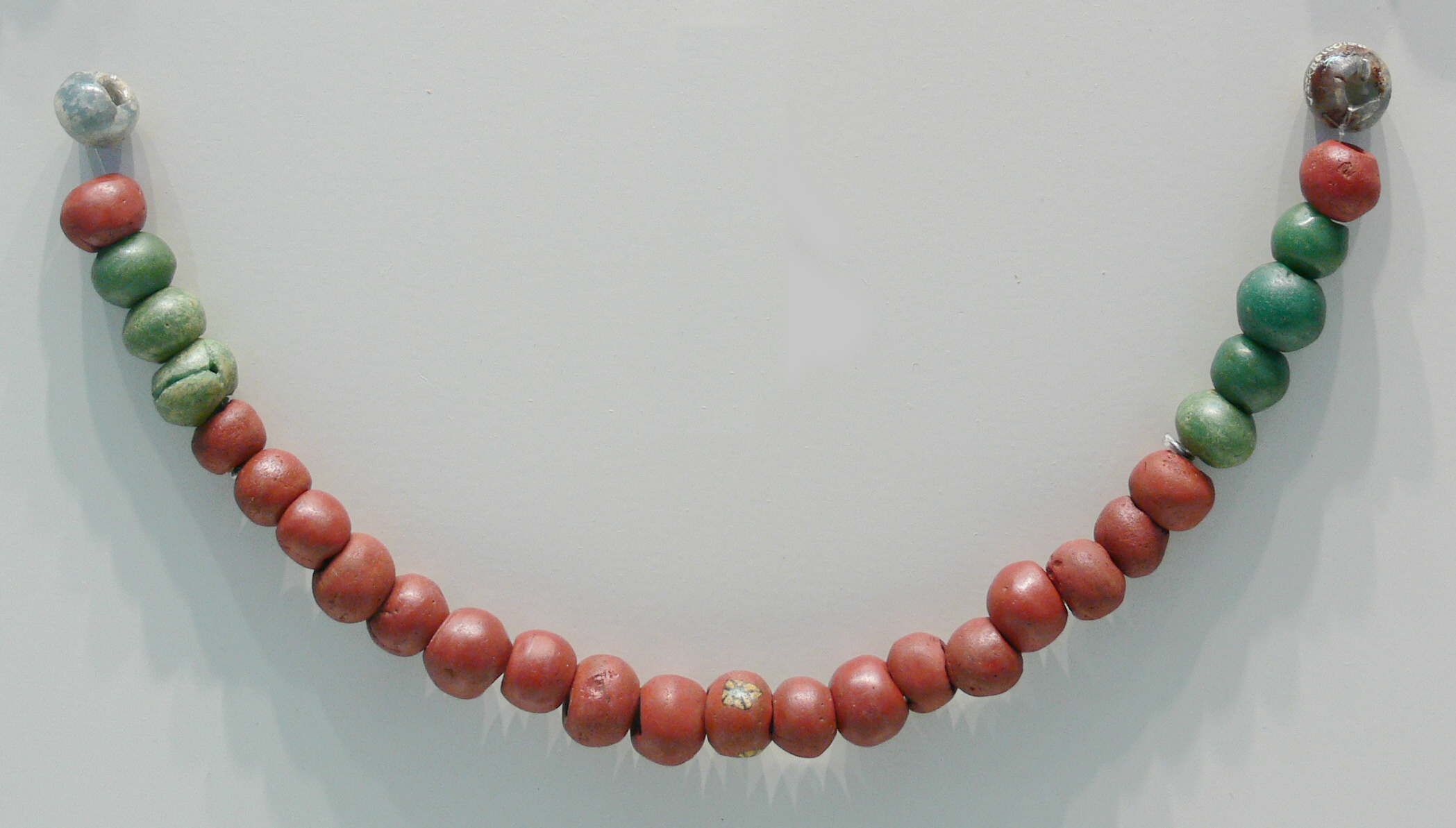 Perlenkette, 3.-4. Jh. n. Chr.; Fundort: Jucknaitschen (Juchnajcie, Polen) oder Germau (Russkoe, Russland) – im Museum nicht objektgenau ausgezeichnet Collection: Museum für Vor- und Frühgeschichte Berlin